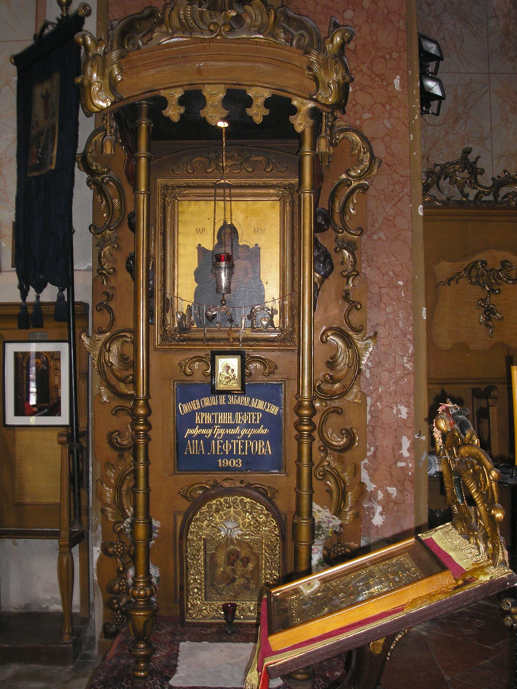 Szűz Mária trónus (Szerb ortodox templom, Szeged)